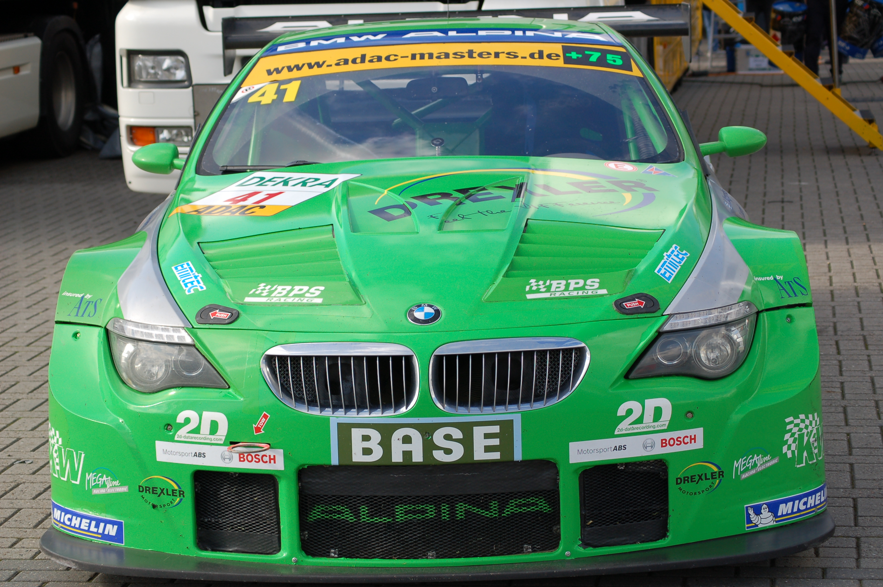 Der Alpina B6 GT3 von Margaritis und Lunardi